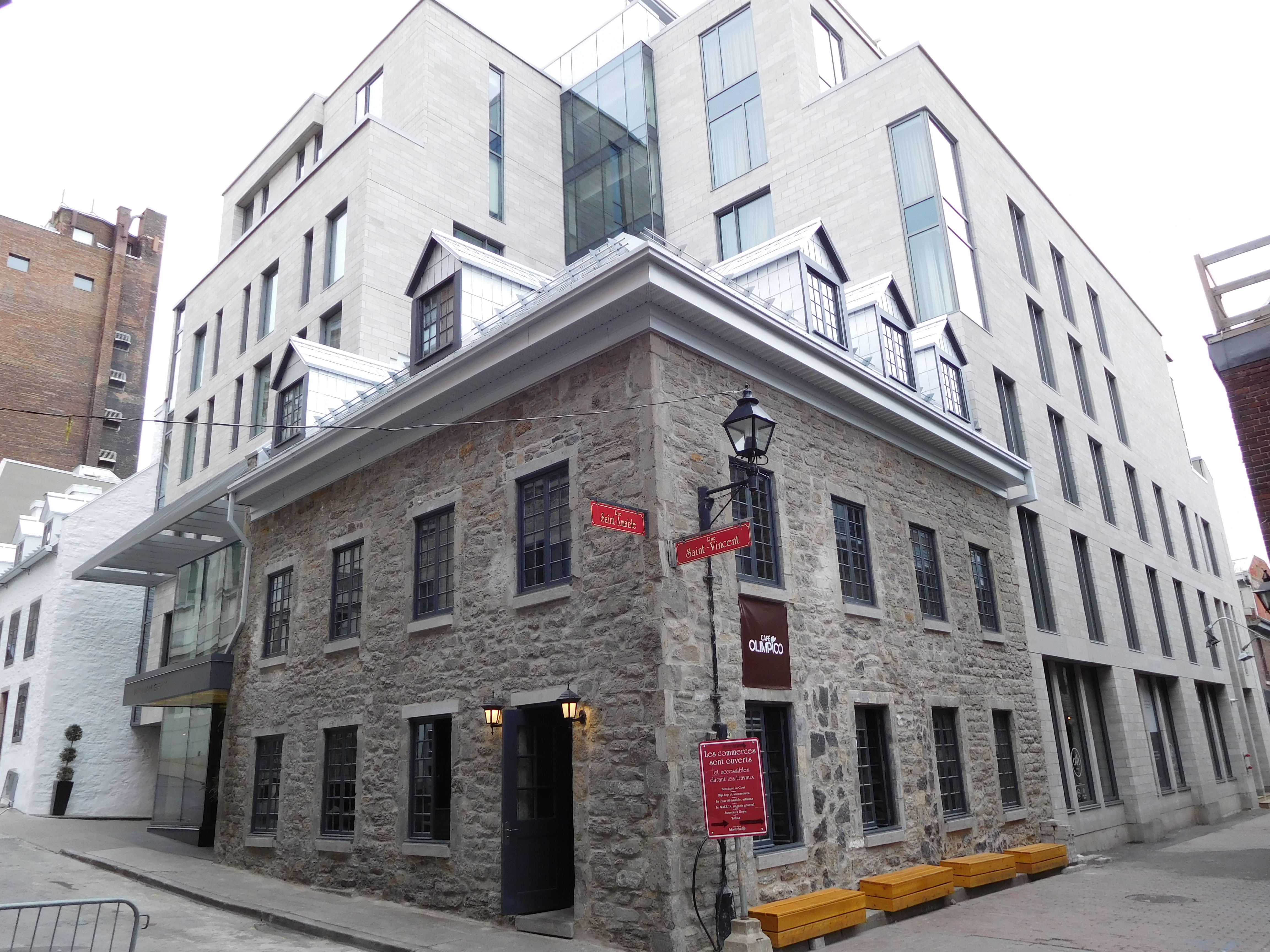 Hôtel William Gray, 421, rue Saint-Vincent, Montréal